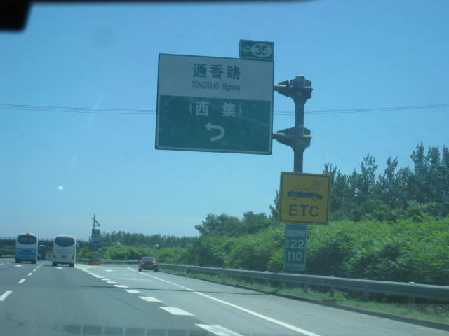 此作品摄于京哈高速西集出口旁的道路指示牌